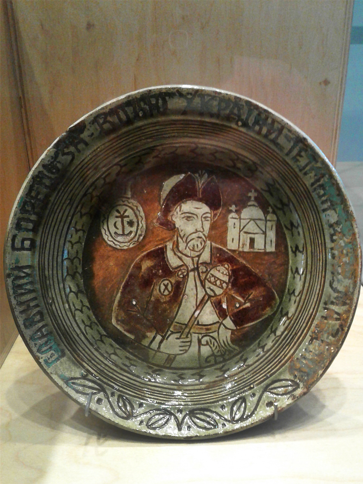 Таріль із зображенням Івана Мазепи. Межигірський керамічній технікум.